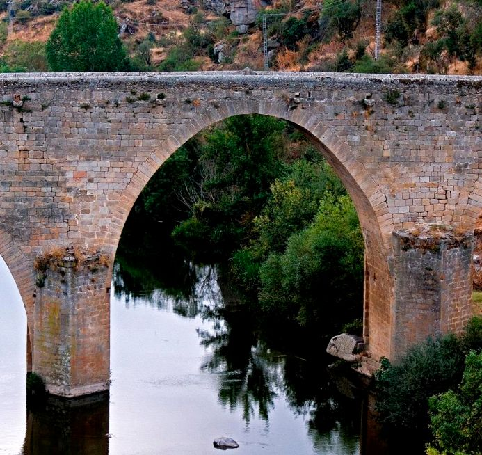 Arco derrumbado en 1812, reconstruido en 1816 por Nicolás Osorio de Zayas y Sotomayor, Conde de Ledesma